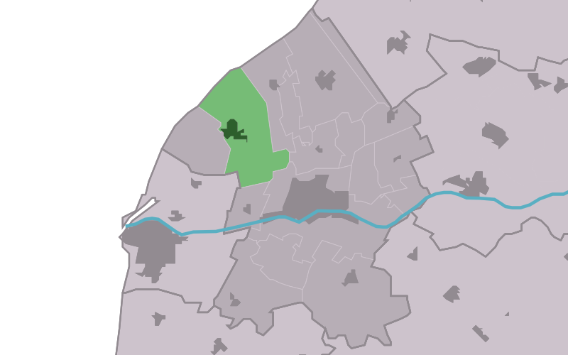 Kaartsje fan himrik fan Seisbierrum